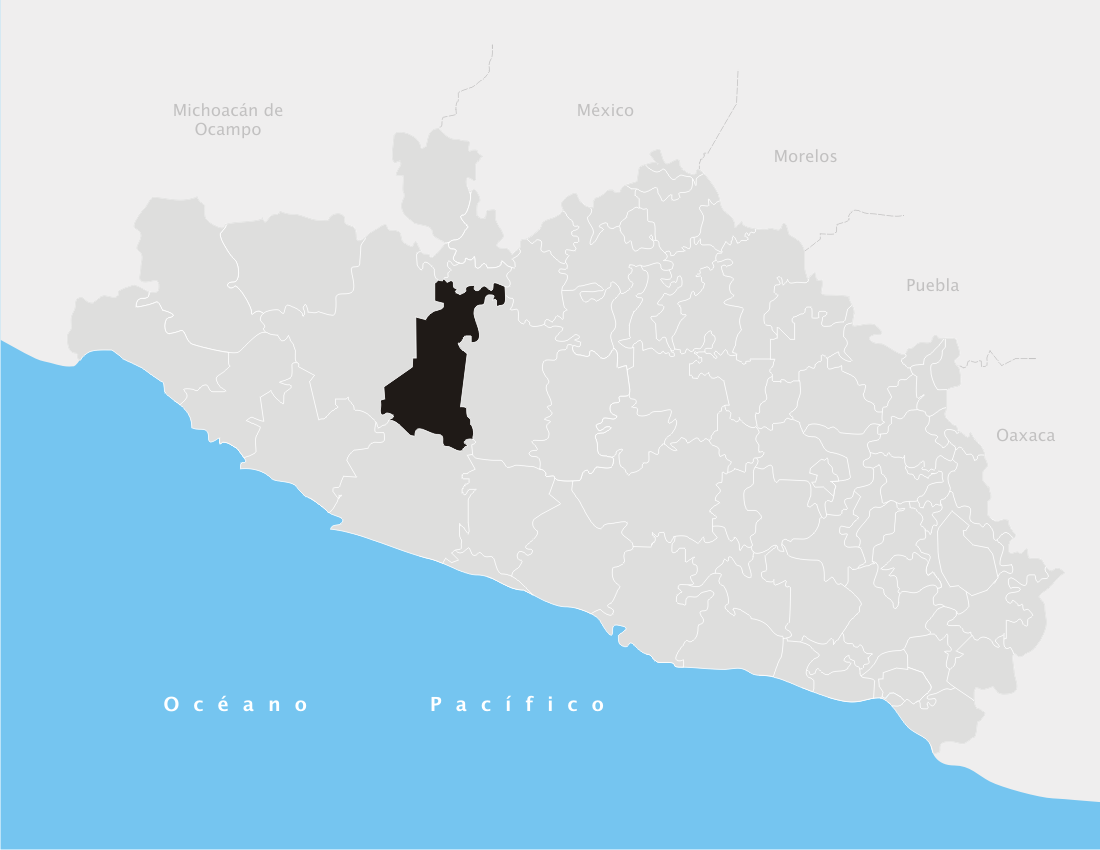 Ajuchitlán en el estado de Guerrero (México)